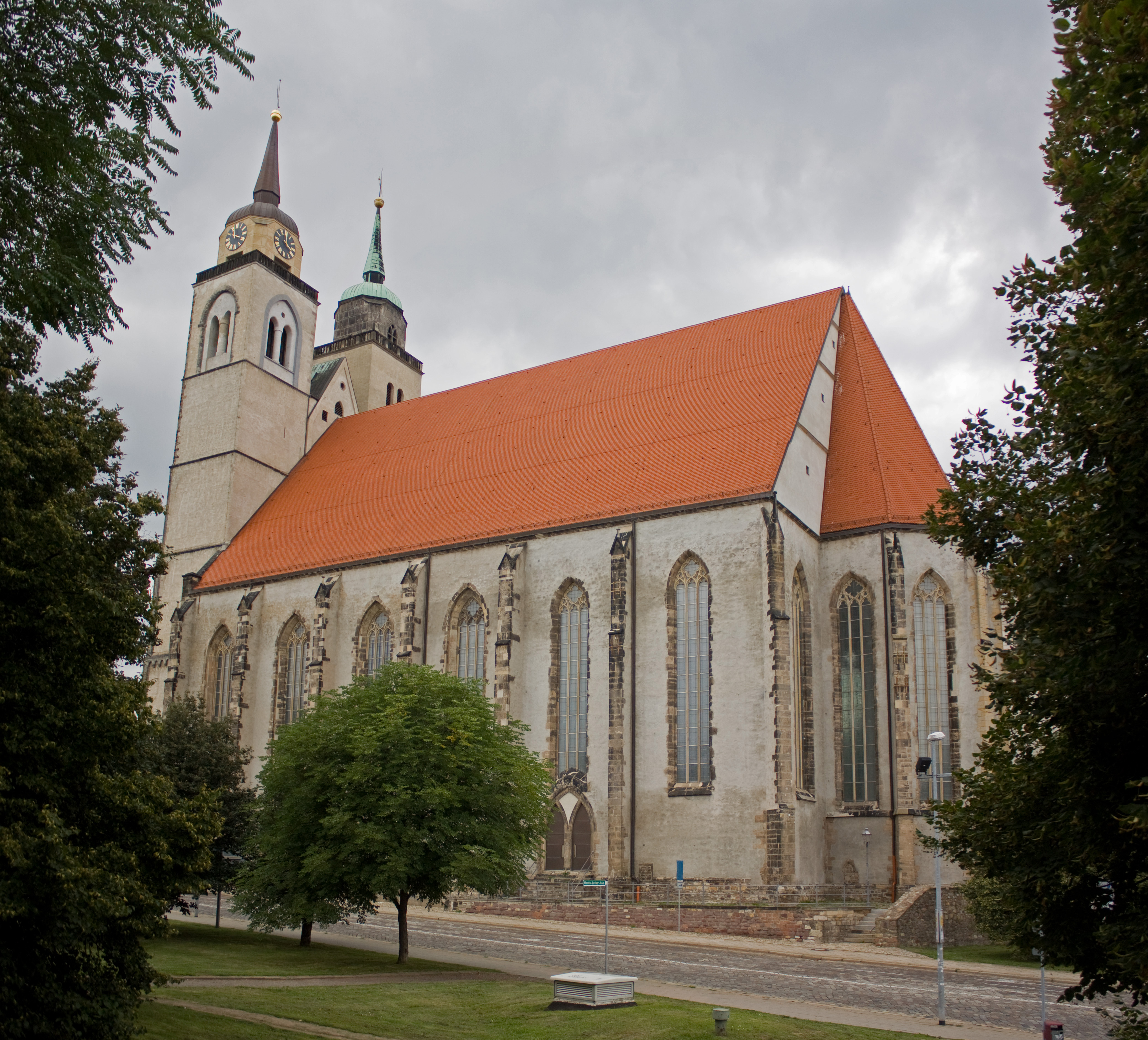 St. Johannis Kirche, Magdeburg